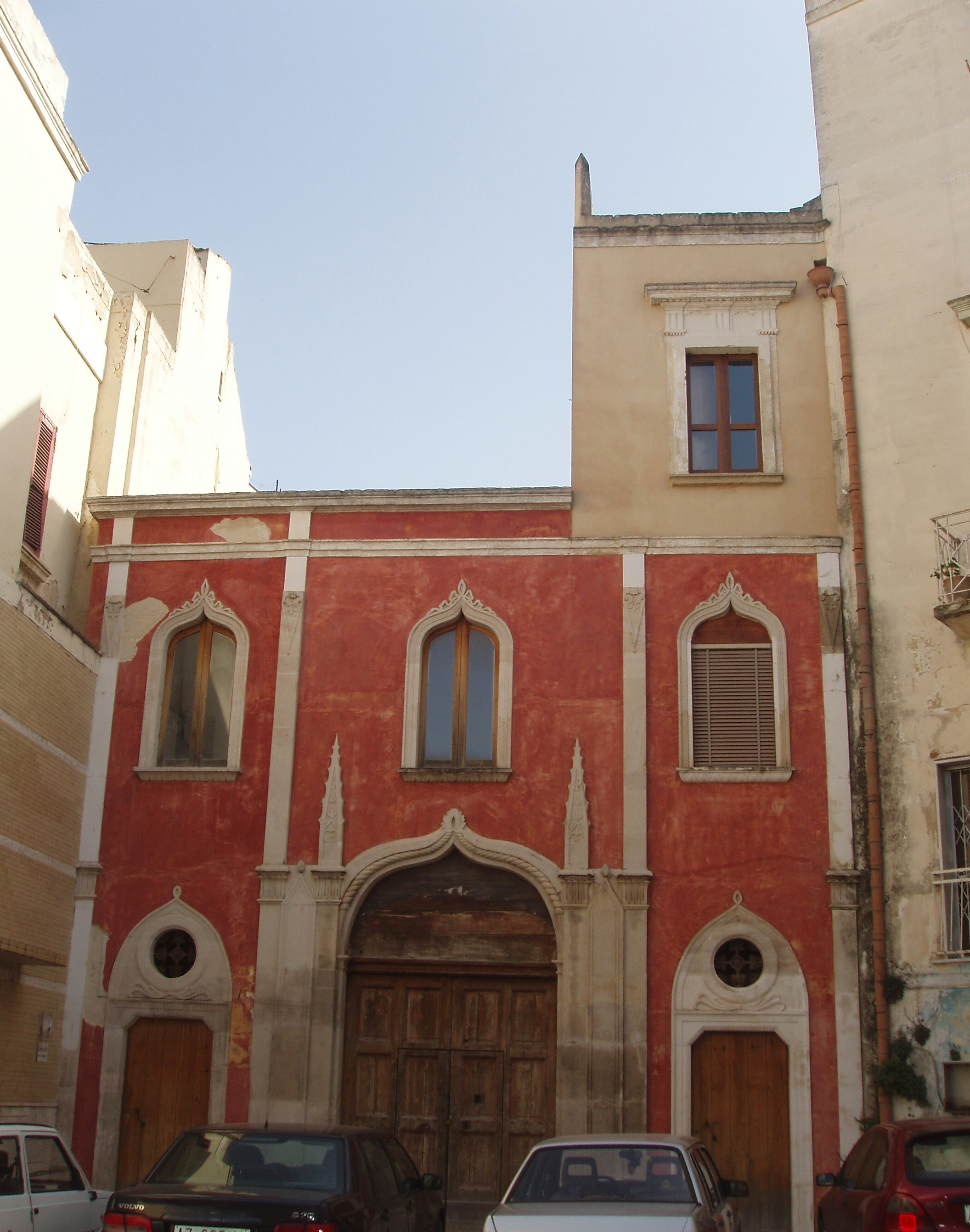 Castellaneta - Palazzo Catalano